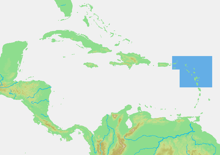 Caribbean - Bovenwindse eilanden.PNG